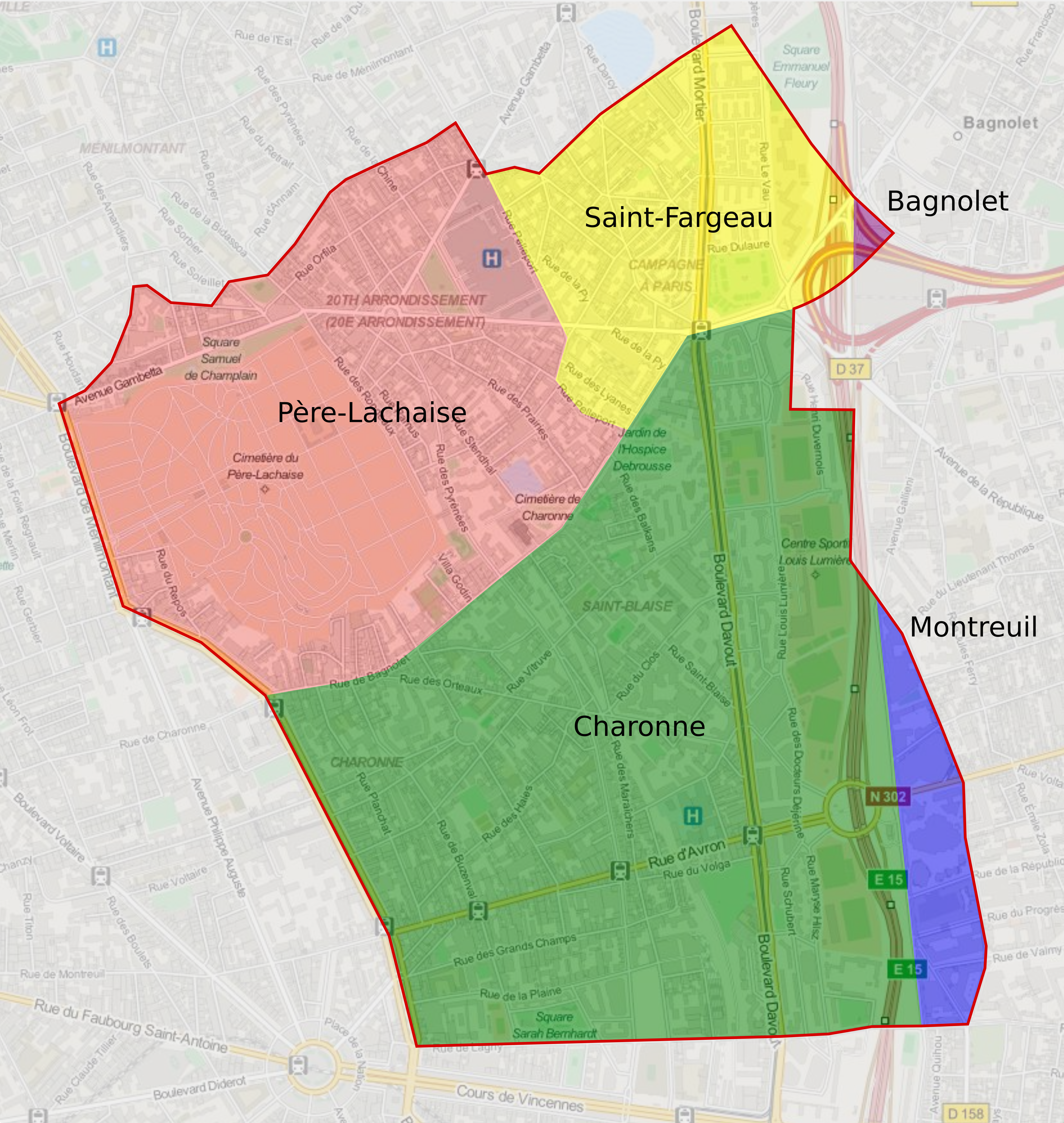 Limites de l'ancienne commune de Charonne, avant son annexion à Paris en 1859, reportées sur un plan moderne et avec la répartition du territoire communale dans les communes et quartiers parisiens.